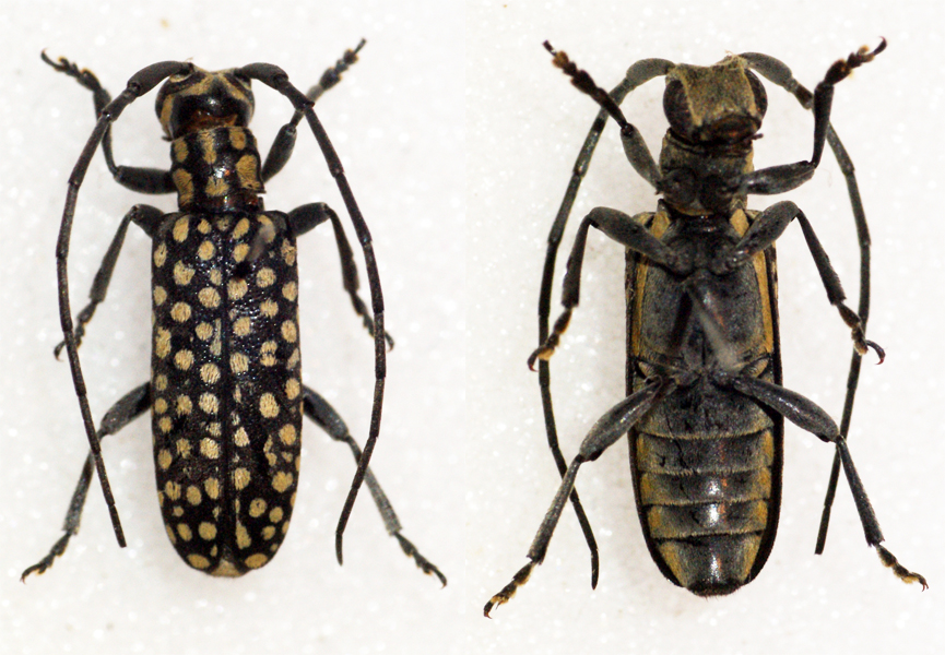 Coquerel,1851 Sex: ? Data: 10-12-2006 - Singada - Tanzania Size: ?